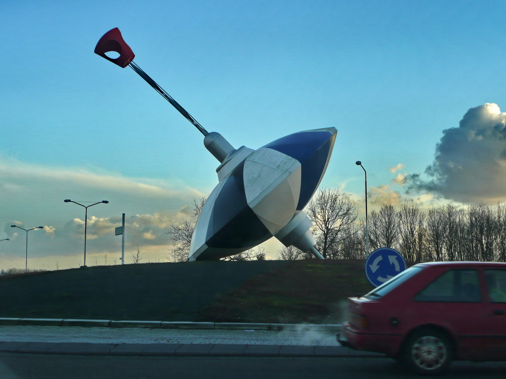 Bromtol. Rotonde N629 bij Made/The Netherlands. Gemaakt door (made by) Piet Hohmann (Breda 1935).